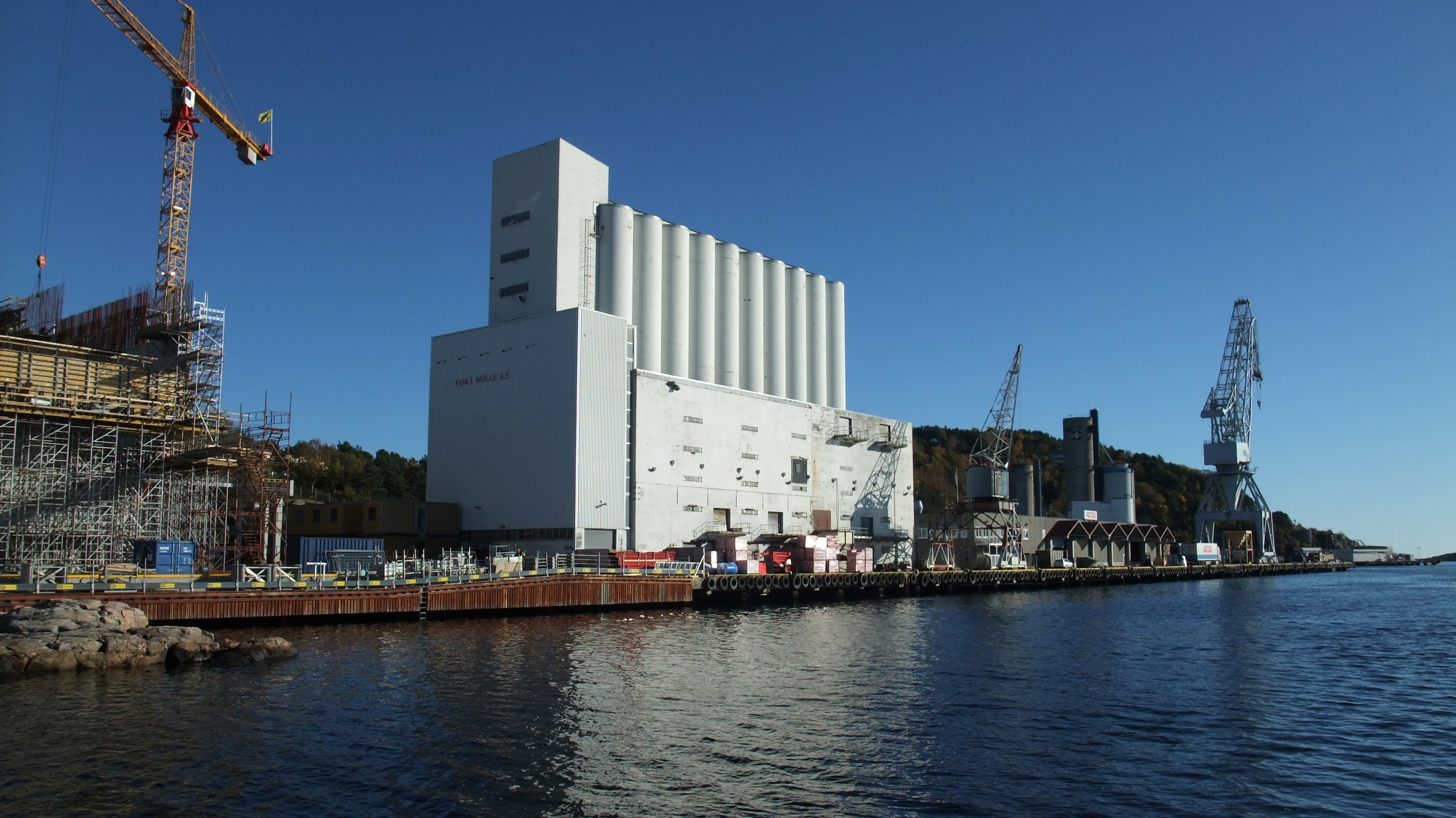 Silo, Silokaia, Odderøya, Kristiansand